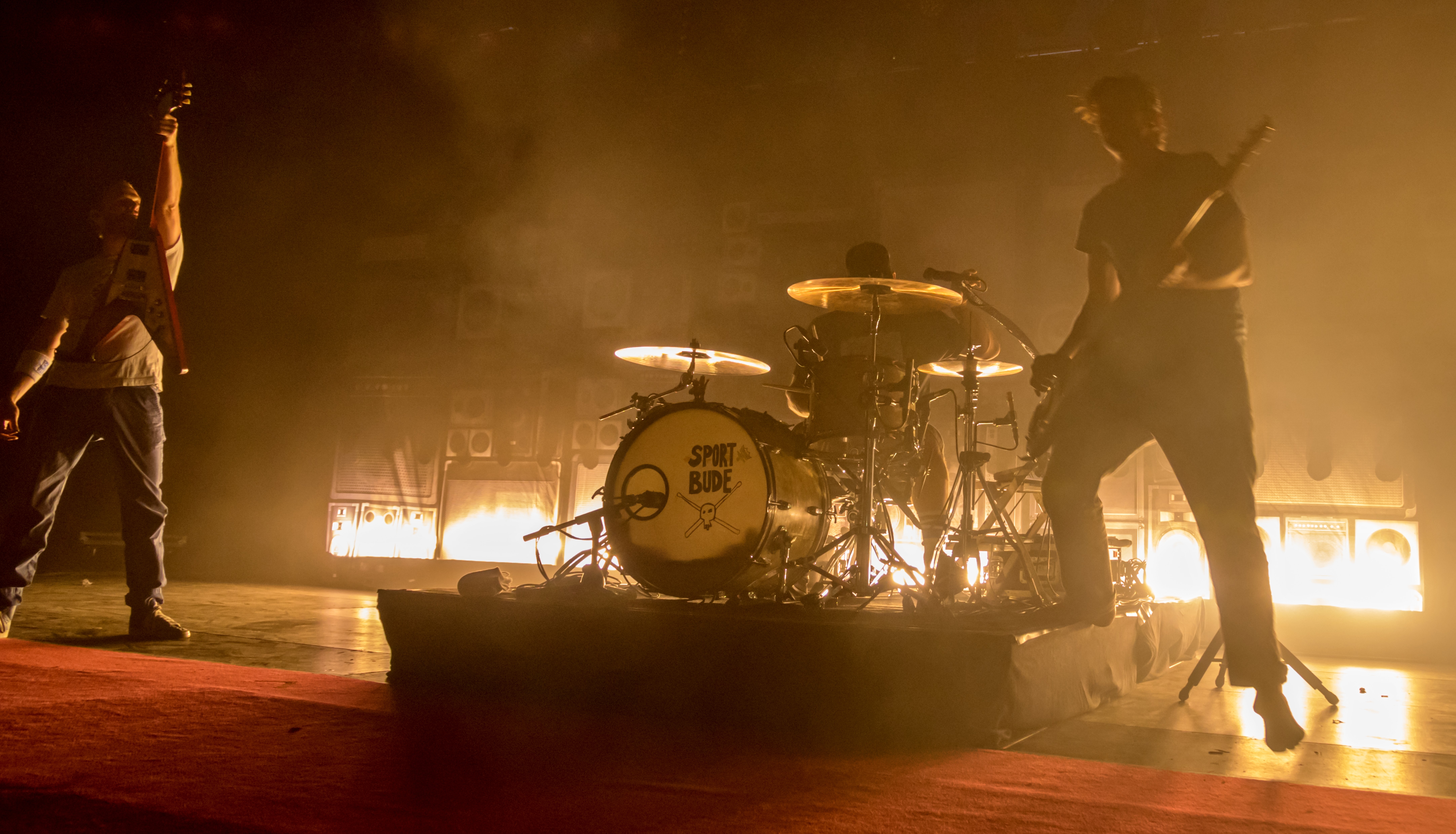 Bilder vom Zelt Musik Festival 2017 in Freiburg im Breisgau Sportfreunde Stiller am 18.07.2017